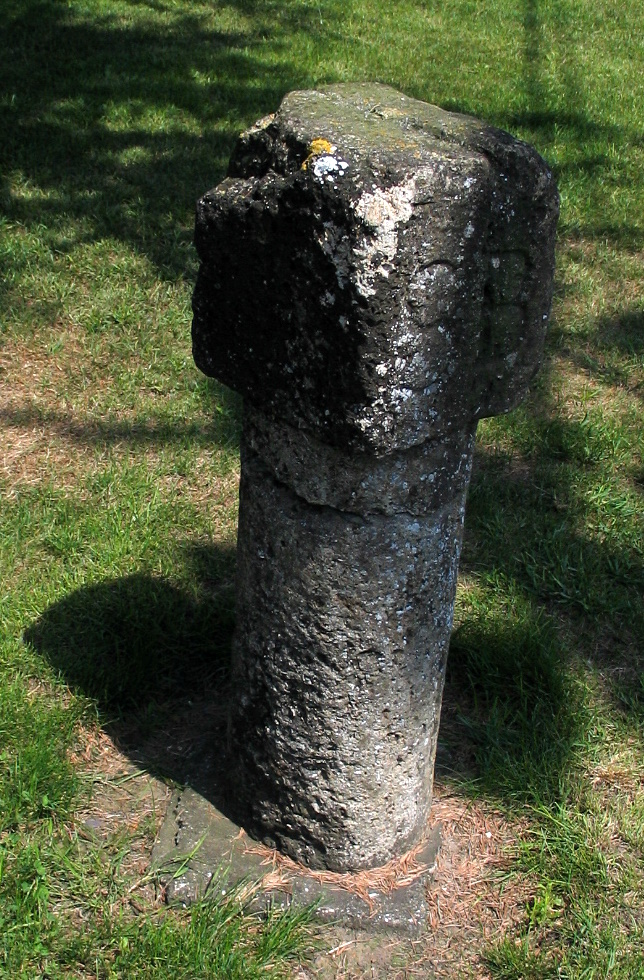 Een tiendpaal in Sint-Margriete (België)